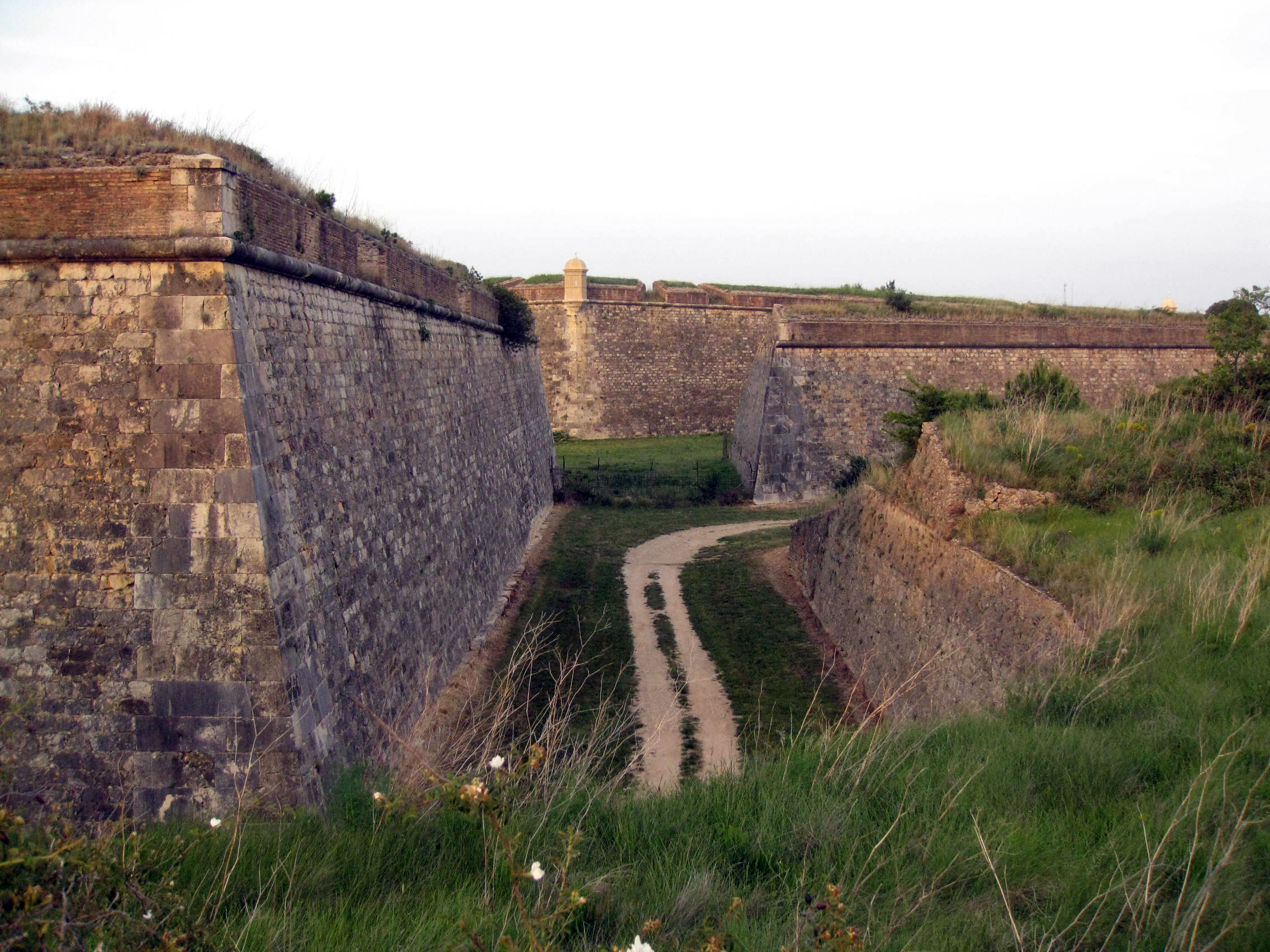 Castell de Sant Ferran (Figueres)